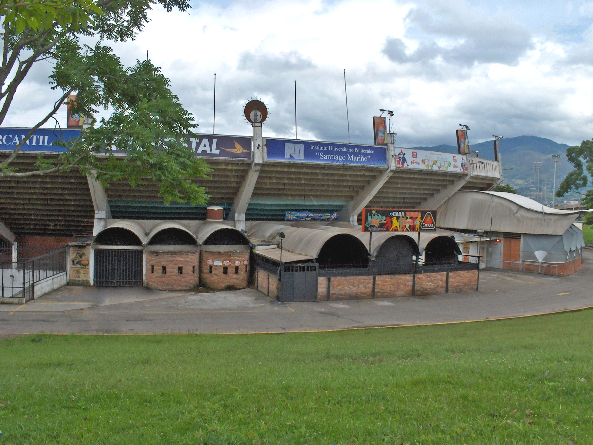 Vista parcial de la Plaza de toros de San Cristóbal, estado Táchira